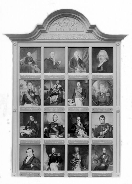 Repronegatief. Lijst met geschilderde miniatuurportretten van personen die het ambt van Gouverneur-Generaal in Nederlands-Indië bekleed hebben in de periode 1797-1851